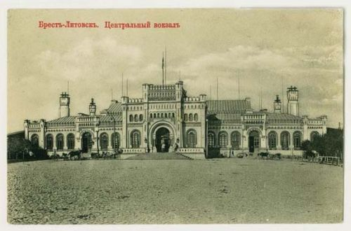 Музей: Мемарыяльны комплекс «Брэсцкая крэпасць-герой» Тып: выяўленчыя крыніцы Від: графіка прыкладная Прадметнае імя: картка паштовая Назва/аўтарская назва: "Брестъ-Литовскъ. Центральный вокзалъ" Аўтары: невядомы; Калектыўныя аўтары: выданне тытунёвай і галантарэйнай крамы Мінца; Матэрыялы: кардон; Тэхналогіі стварэння: друк; Дата стварэння: пачатак ХХ ст. Месца стварэння: Расійская Імперыя, г. Брэст-Літоўск Памеры: 8,8 см х 13,8 см